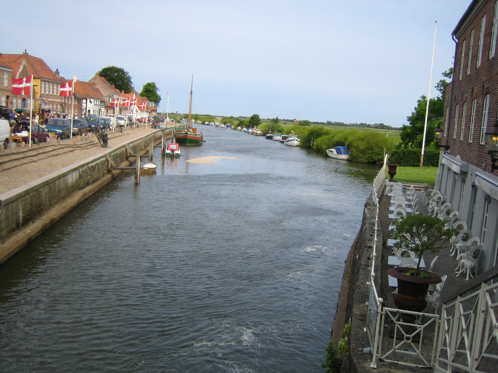 Hafen von RibeDansk: Skibbroen i Ribe juni 2006